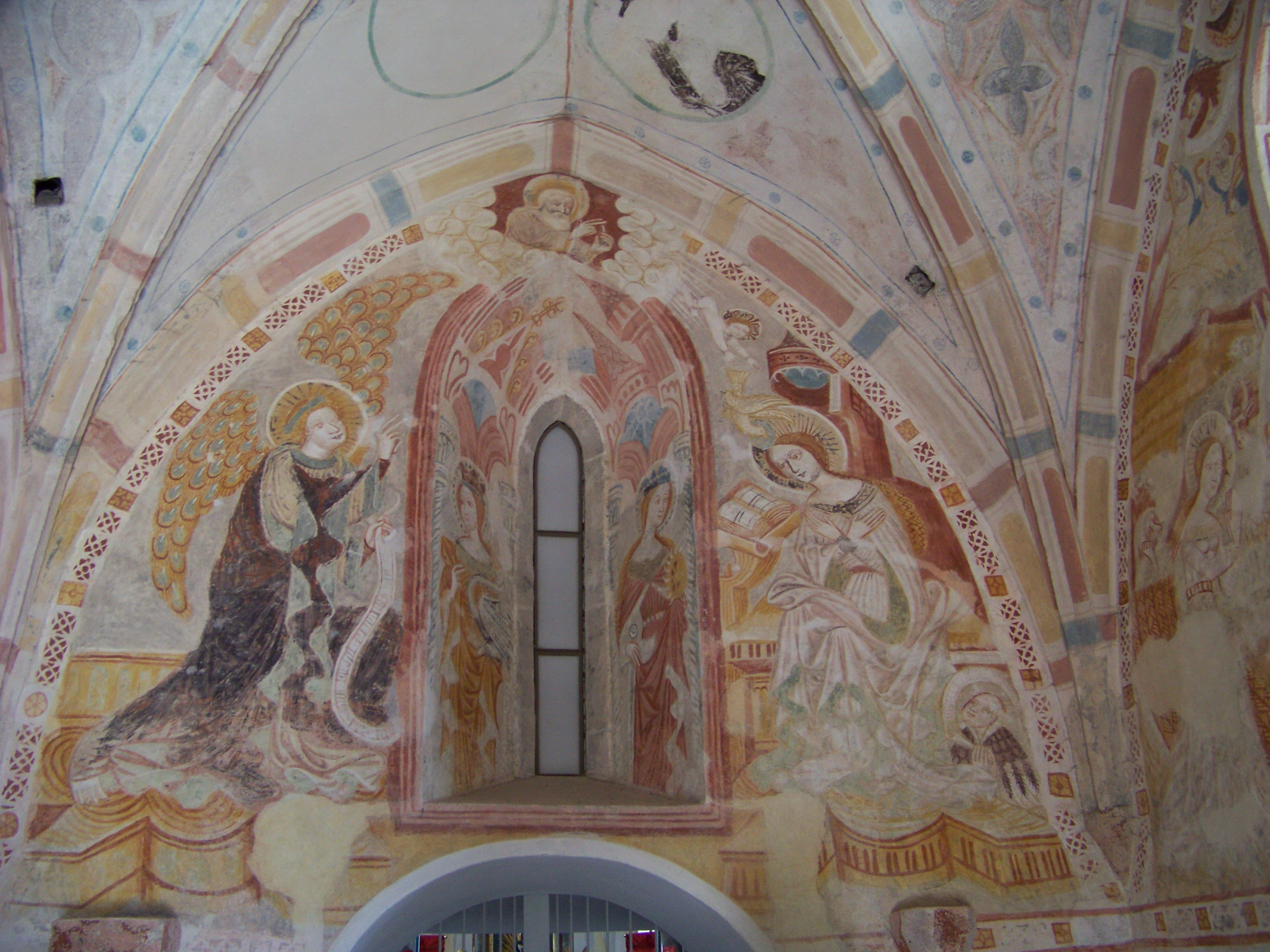 Linden, Kindergartenweg 7. Katholische Filialkirche Sankt Maria und Maternus, genannt Maria zu den Sieben Schmerzen. Barocker Saalbau mit westlichem unverputztem Satteldachturm, ehemals Chorturm um 1400. Das Fresko im Untergeschoss des Turms stammt aus der Zeit um 1400 und zeigt im Osten Mariä Verkündigung, in der Laibung des Fensters im Osten die heiligen Barbara und Katharina.